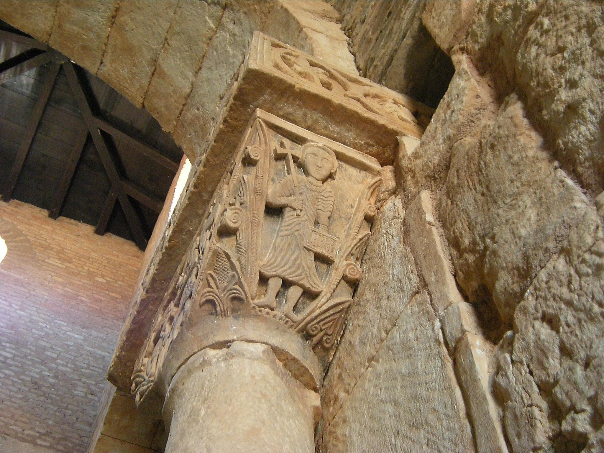 En una de las caras del capitel que muestra el sacrificio de Isaac, podemos ver una hermosa talla de San Pedro, con cruz en la mano derecha y un libro en la izquierda, en el que se puede leer "LIBER"